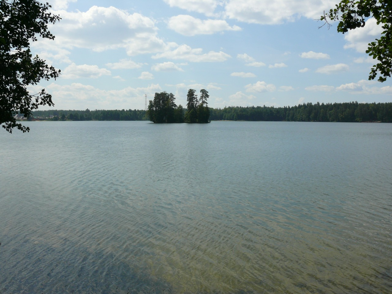 Озеро Таир, Звениговский район This image is related to the protected area of Russia number 1210030